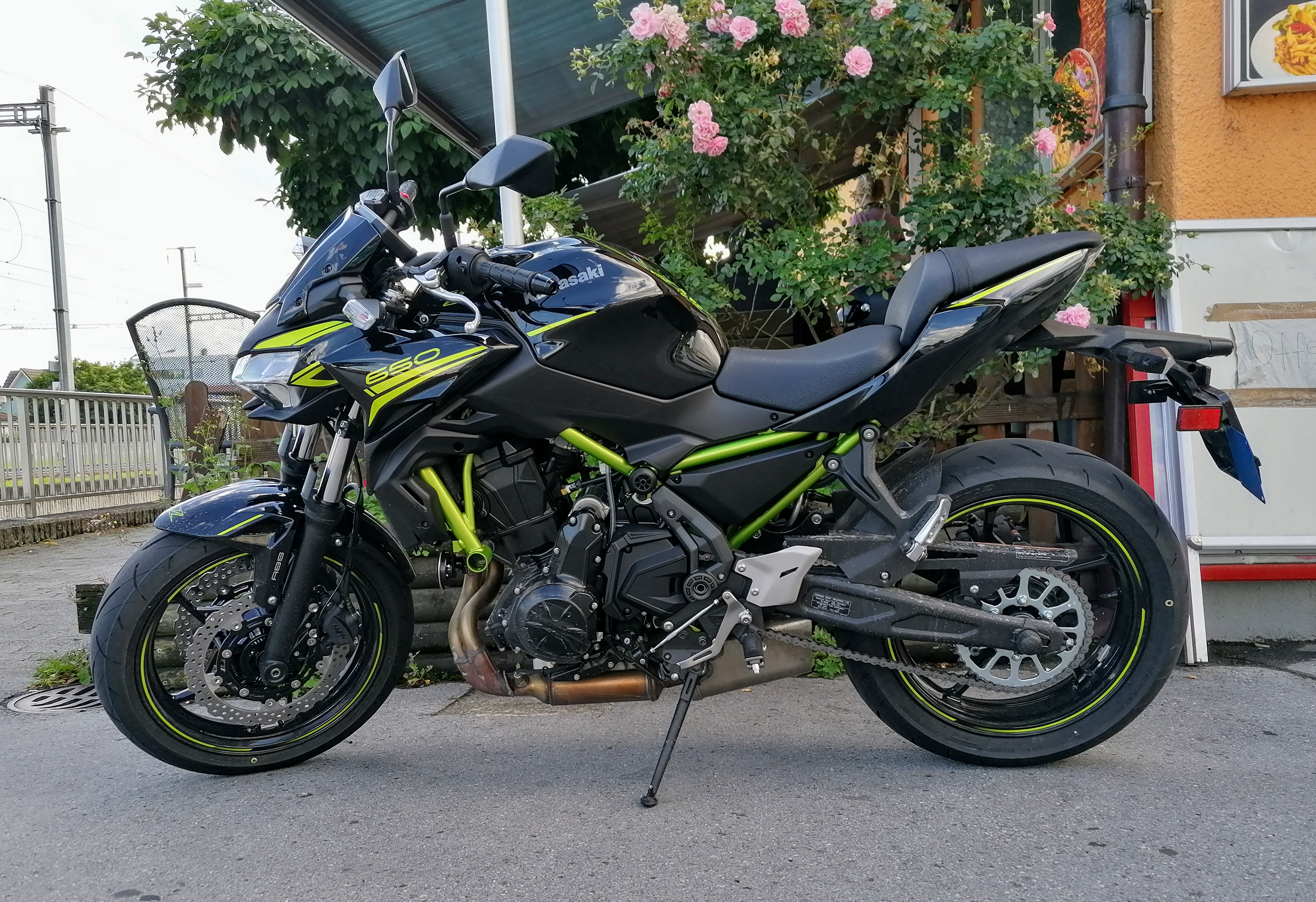 Kawasaki Z650 schwarz Modell 2020 in Heerbrugg am Bahnhof